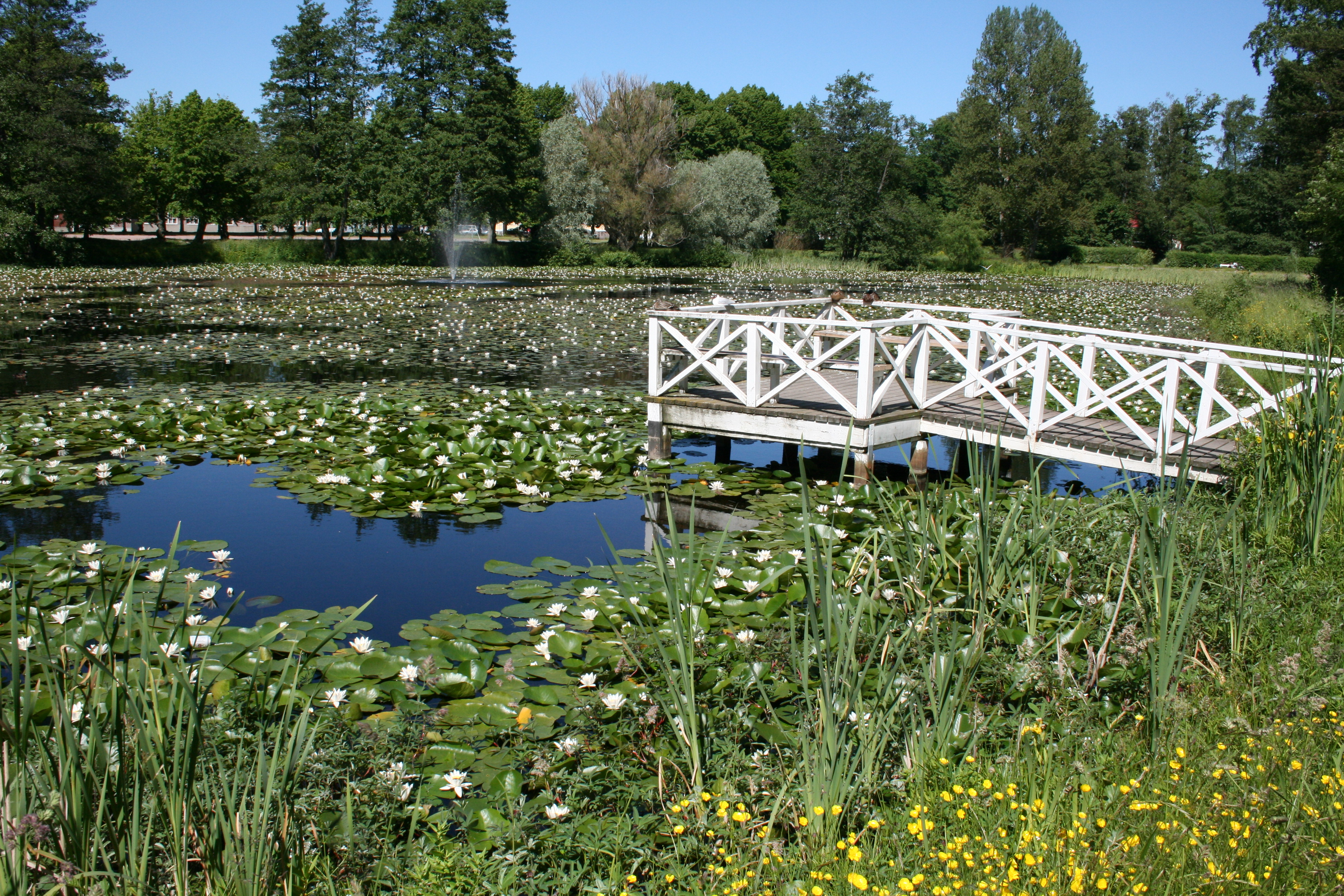 Lumpeikko lammessa Hangon keskustan koulun vieressä